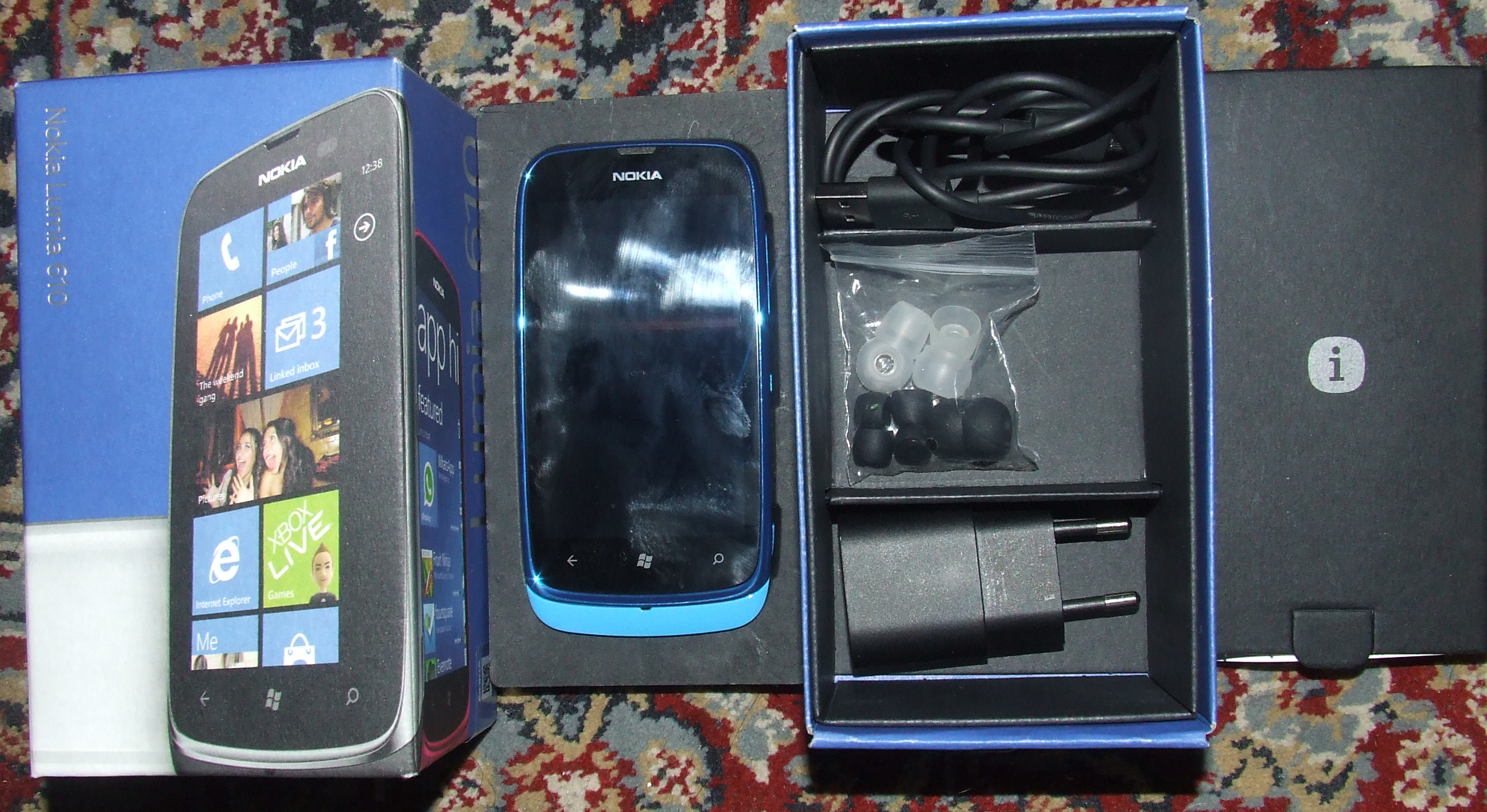 Contenuto scatola del Nokia Lumia 610